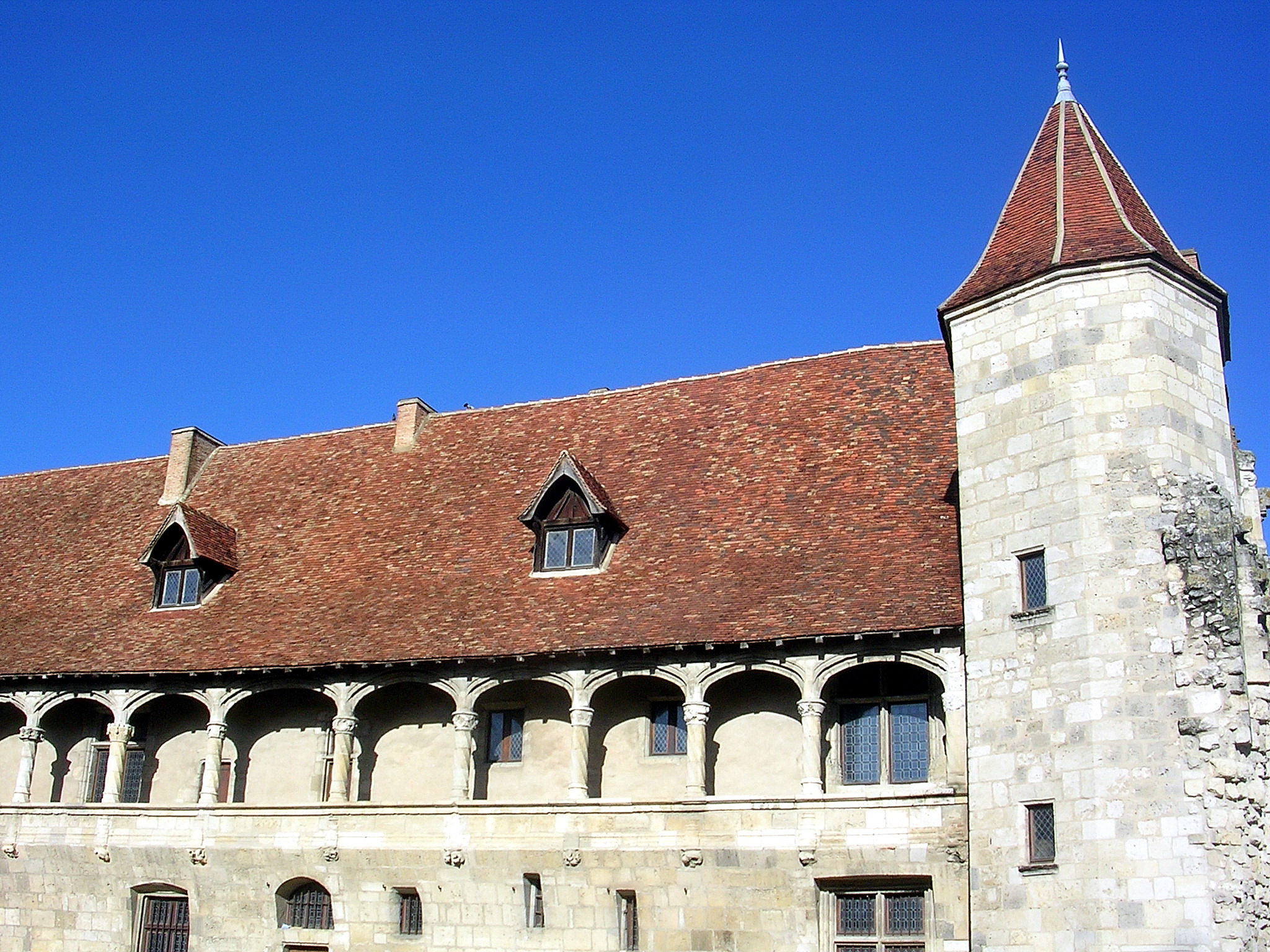 Château de Nérac, Lot-et-Garonne (France)